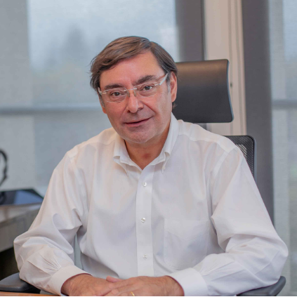 Foto de Felipe Guevara en 2019